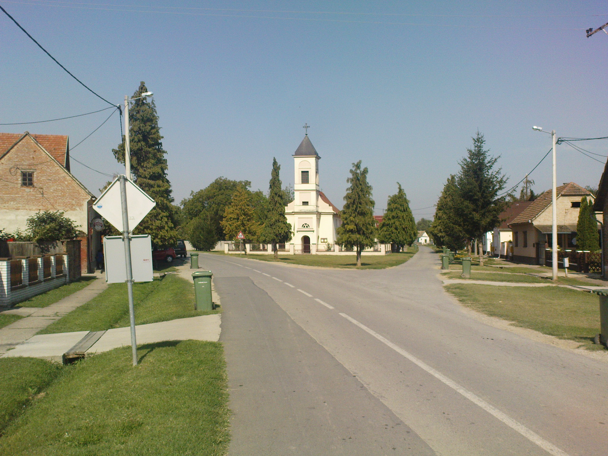 Crkva